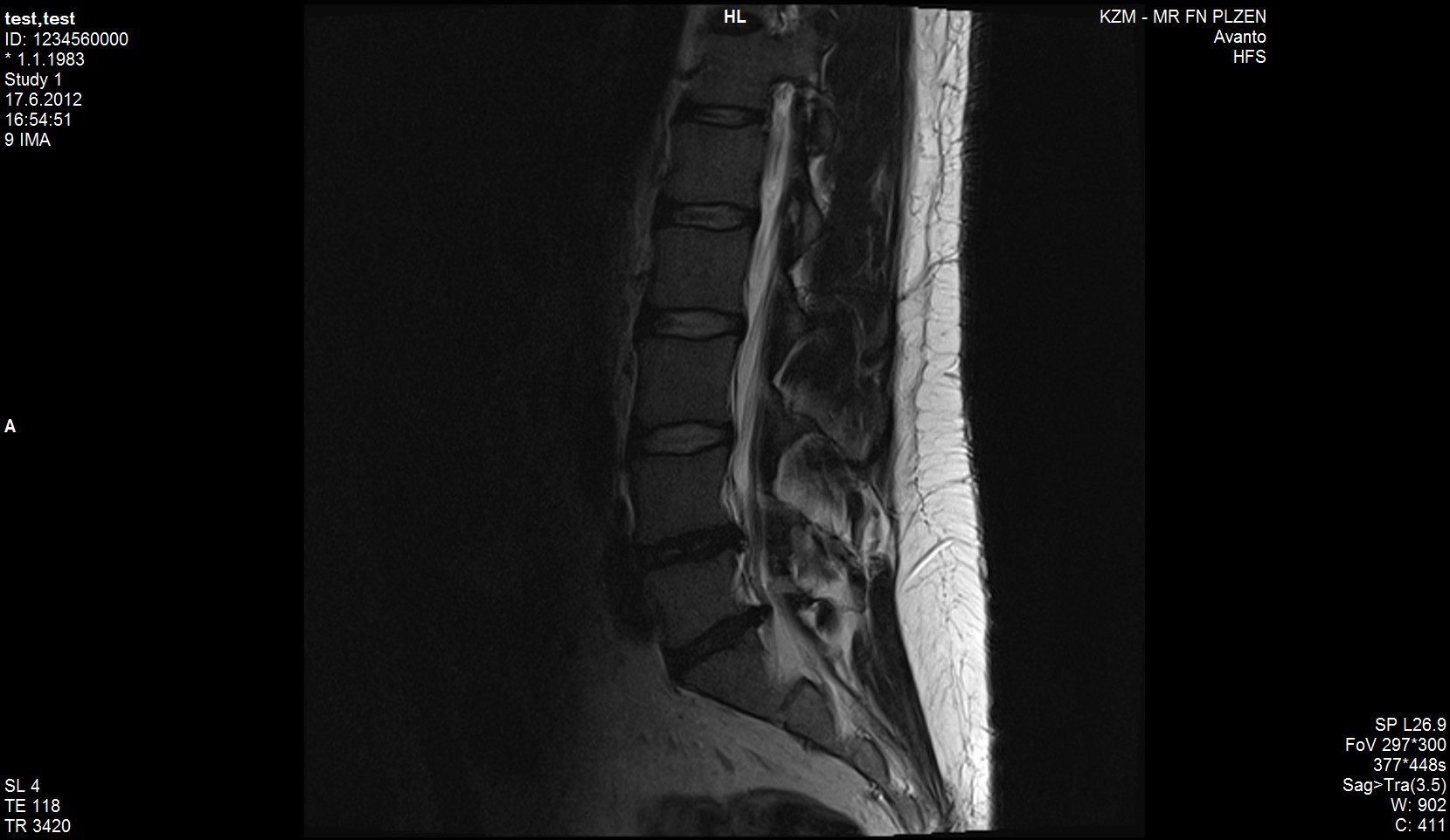 MR bederní páteře v sagitálním řezu. V etáží L5-S1 je vidět levostranný laterální výhřez plotýnky, která utiskuje nerv. Unknown